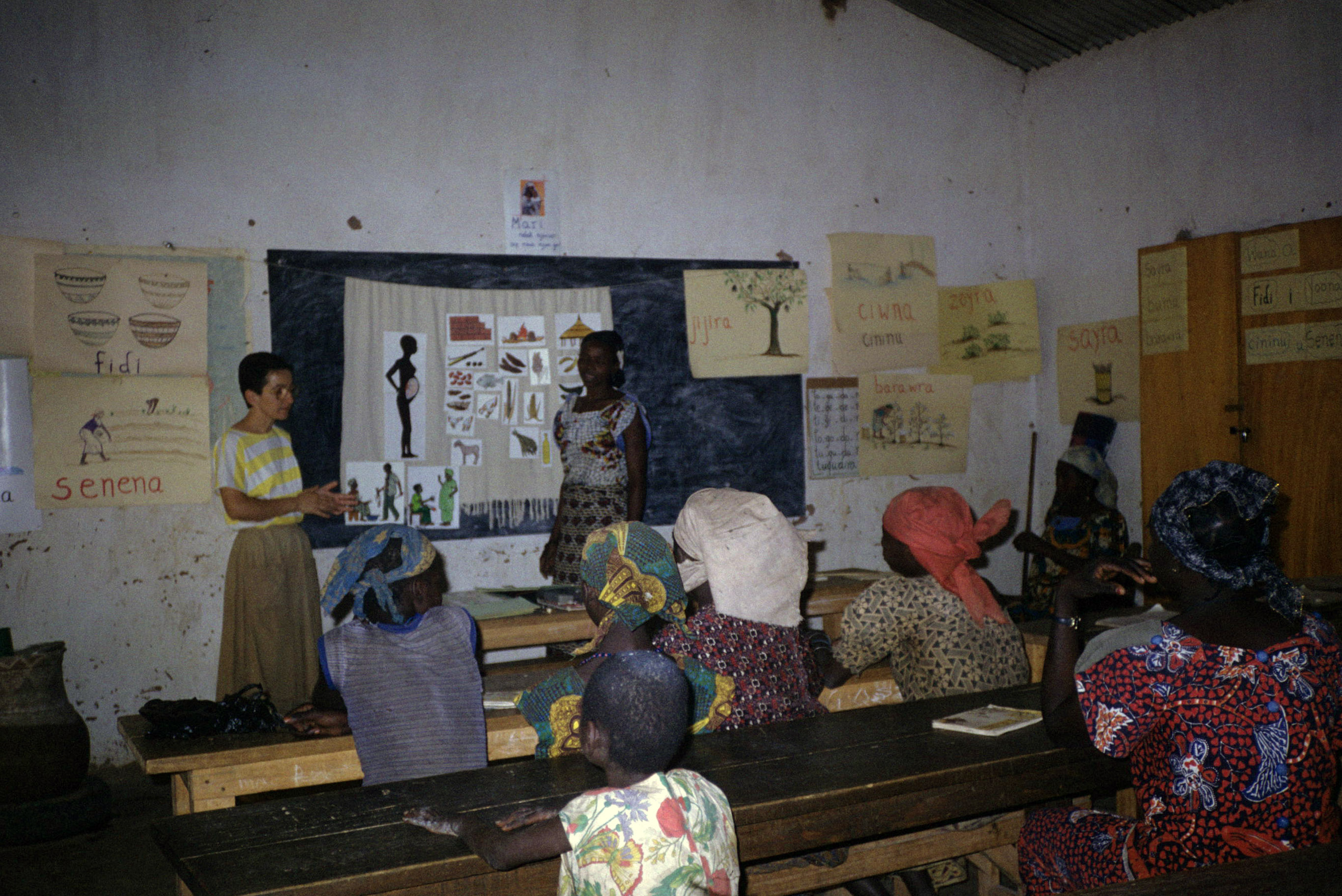 Animazione Sanitaria per le donne in Berem, Ciad